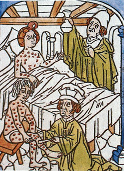 A szifilisz gyógyítása a 15 században